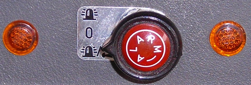 Drehschalter für Sondersignale (der Alarmdrehknopf steuert die Rundumkennleuchte und/oder das Folgetonhorn), historisch